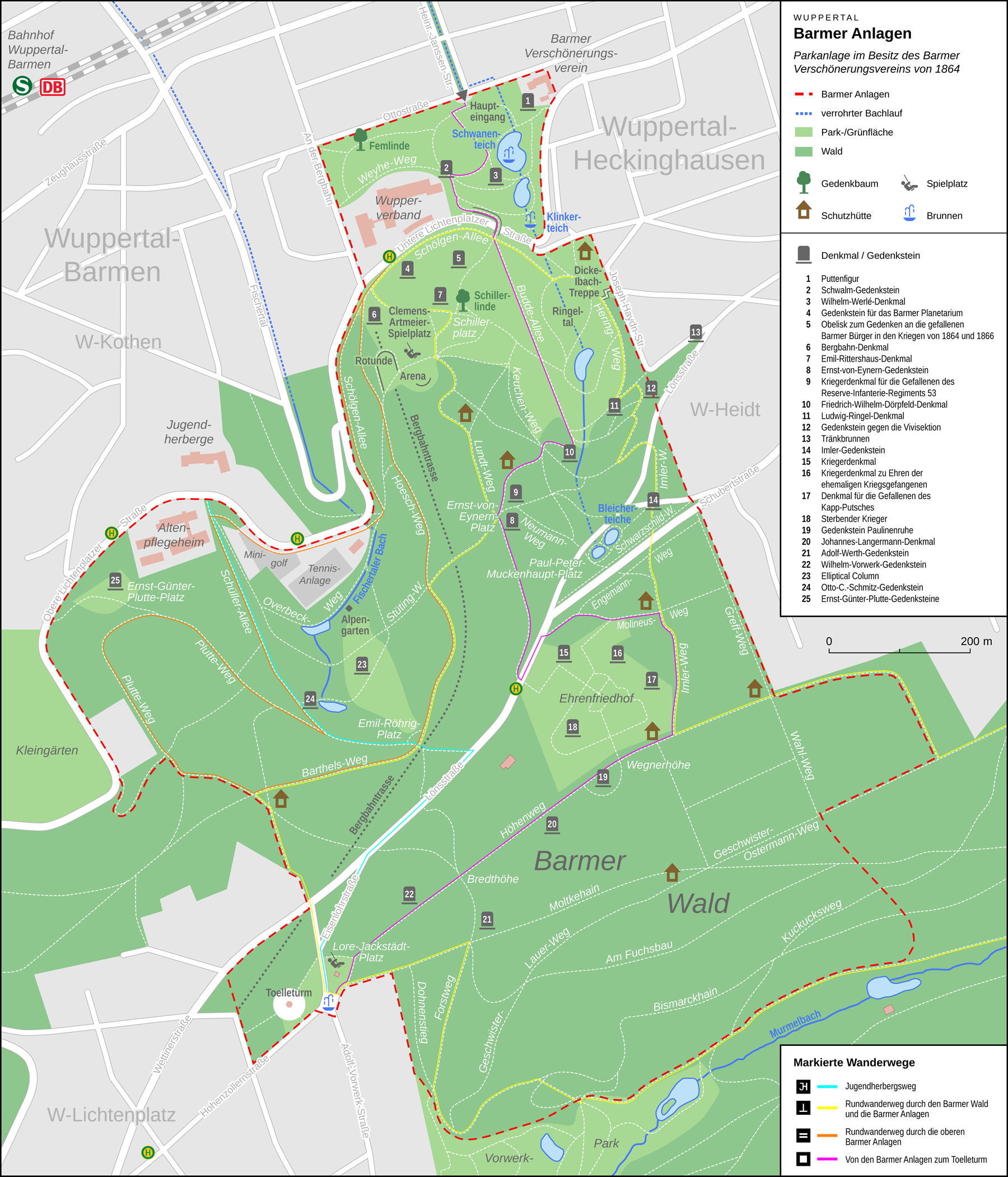 Übersichtskarte der Barmer Anlagen in Wuppertal